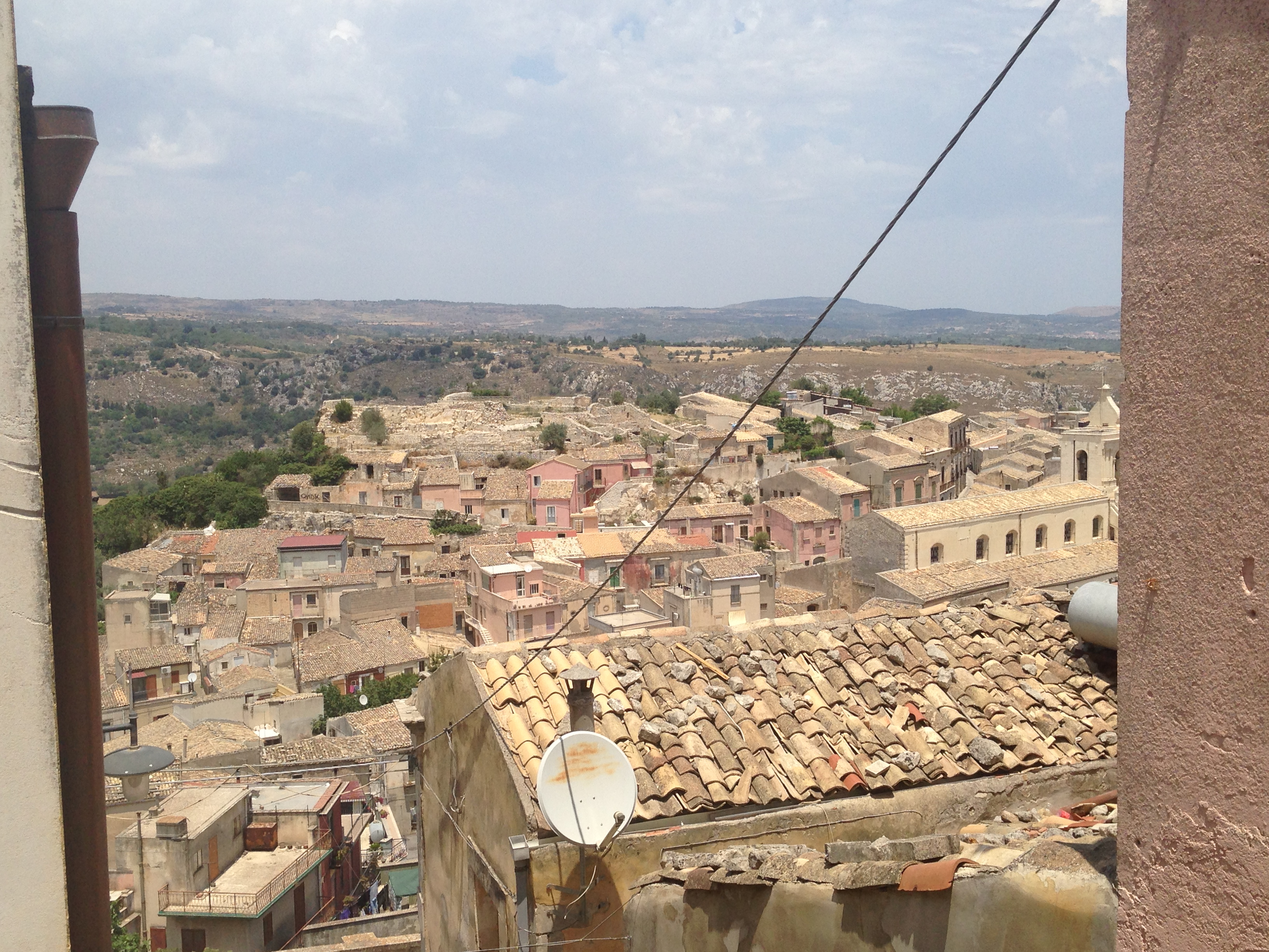 castello di Palazzolo da via Lenza